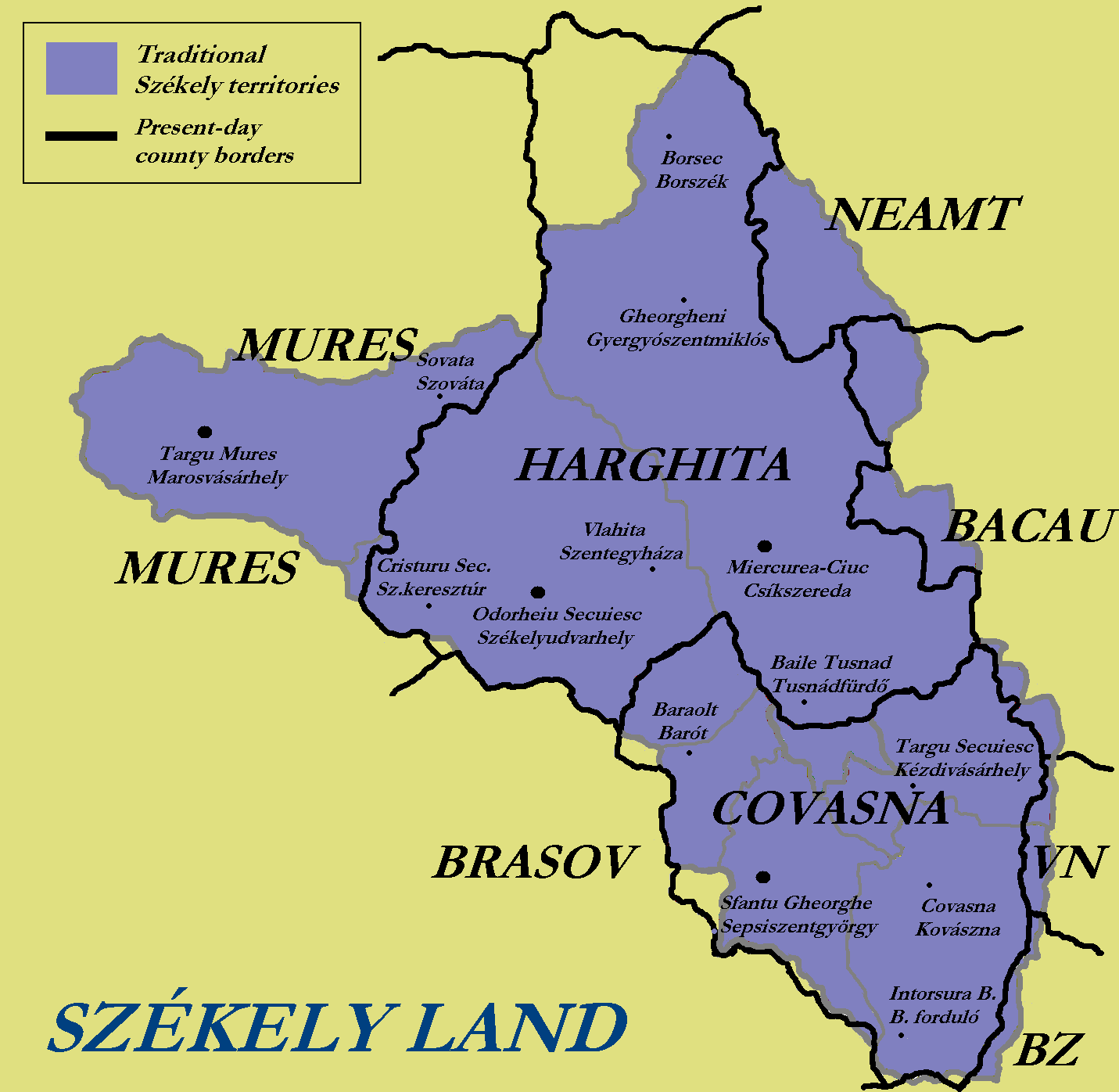 map